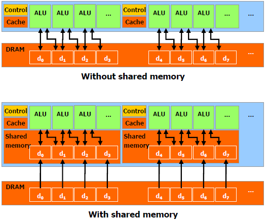 Bendra atmintis pagreitina duomenų apsikeitimą tarp ALU